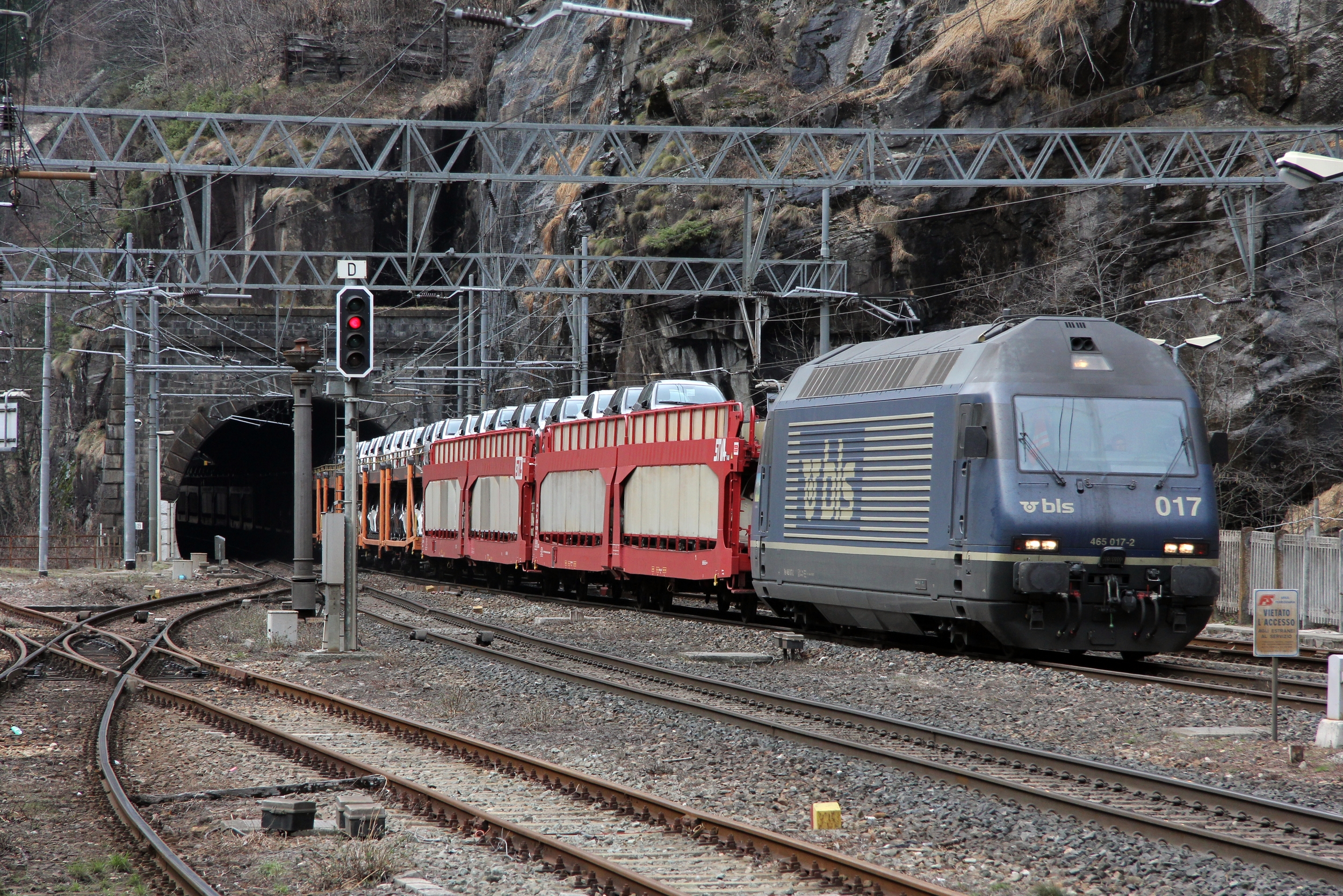 La Re 465 017-2 "Schrattenflue" du BLS en tête du 49609 Onnaing - Alessandria (transportant des voitures neuves) sort du tunnel d'Iselle.